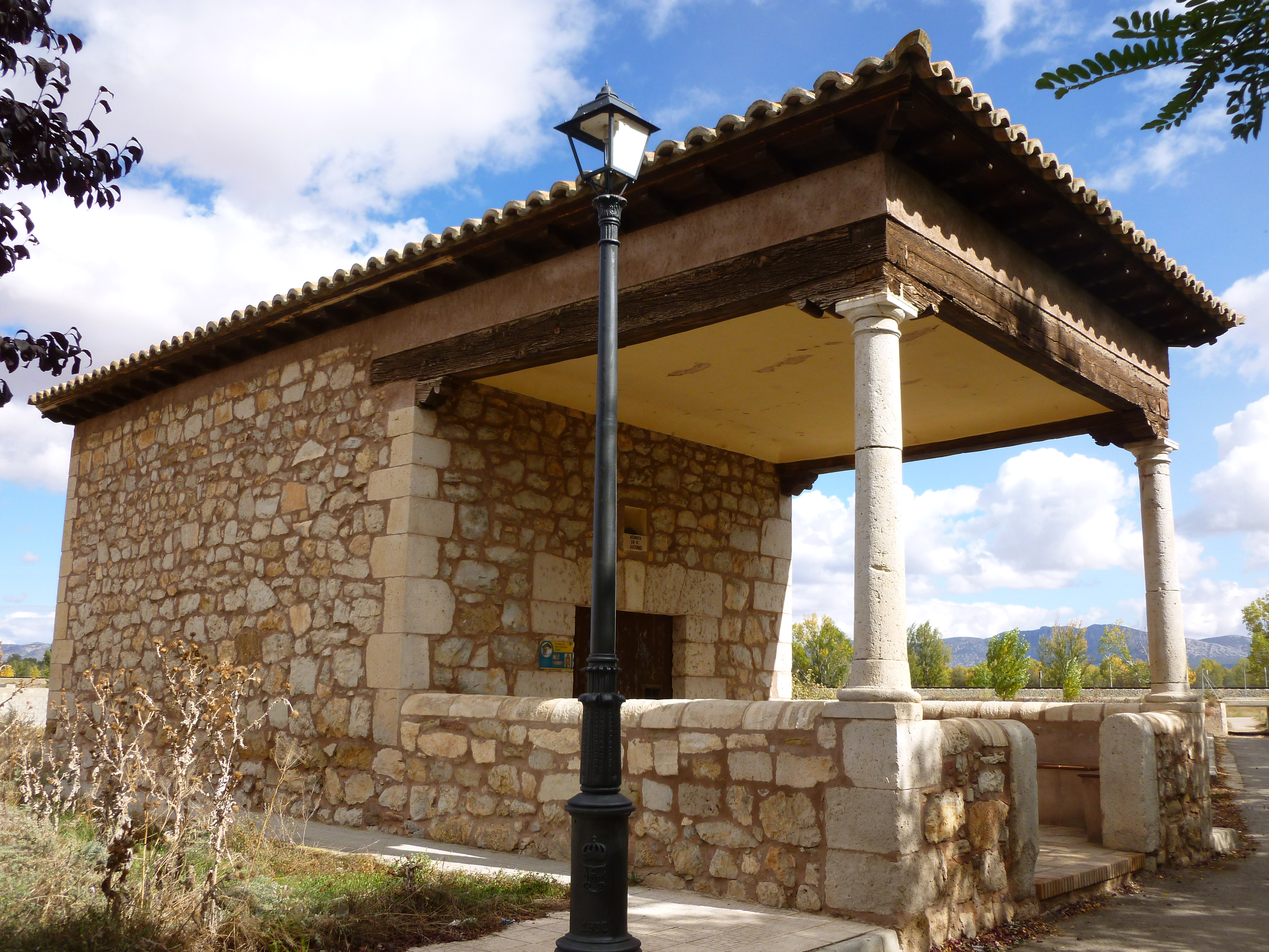 Santa Eulalia del Campo